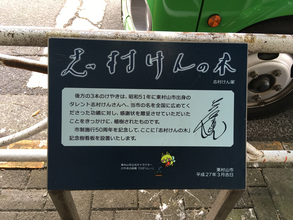 「志村けんの木」の案内看板